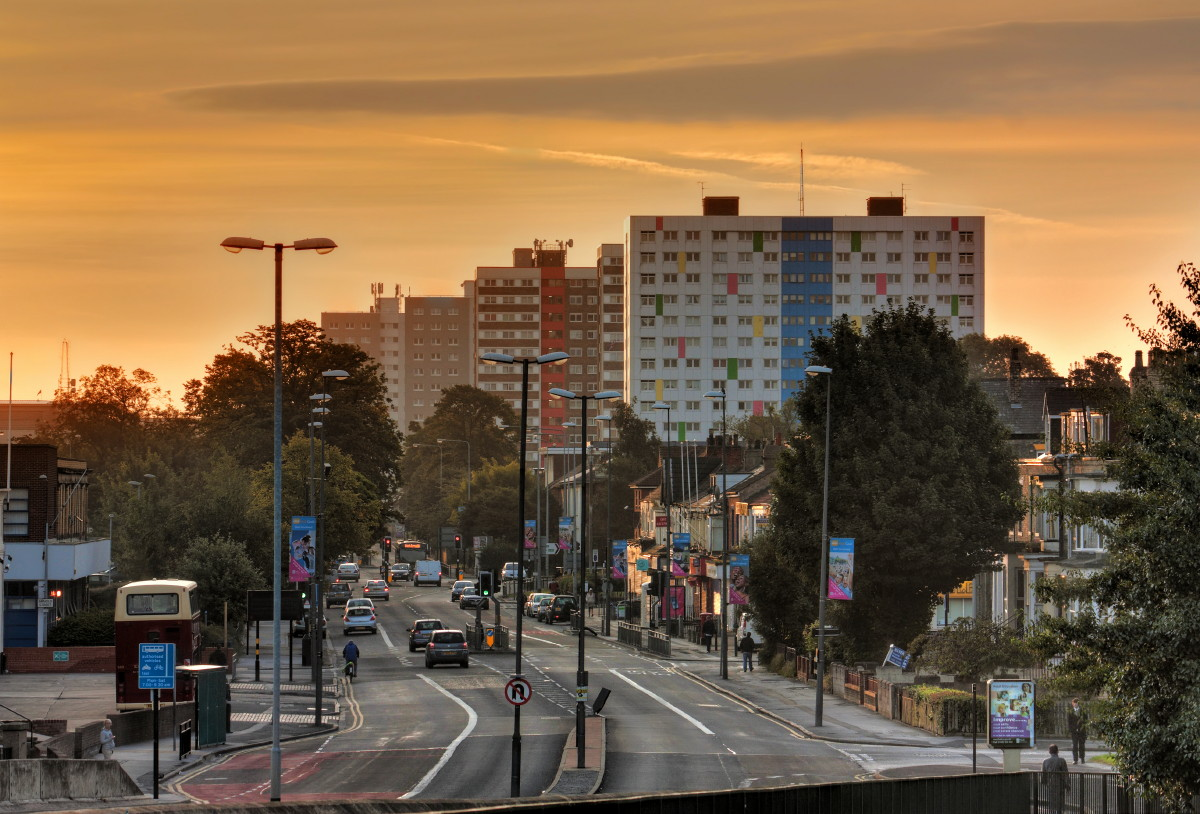 Anlaby Rd, Hull am img_2085